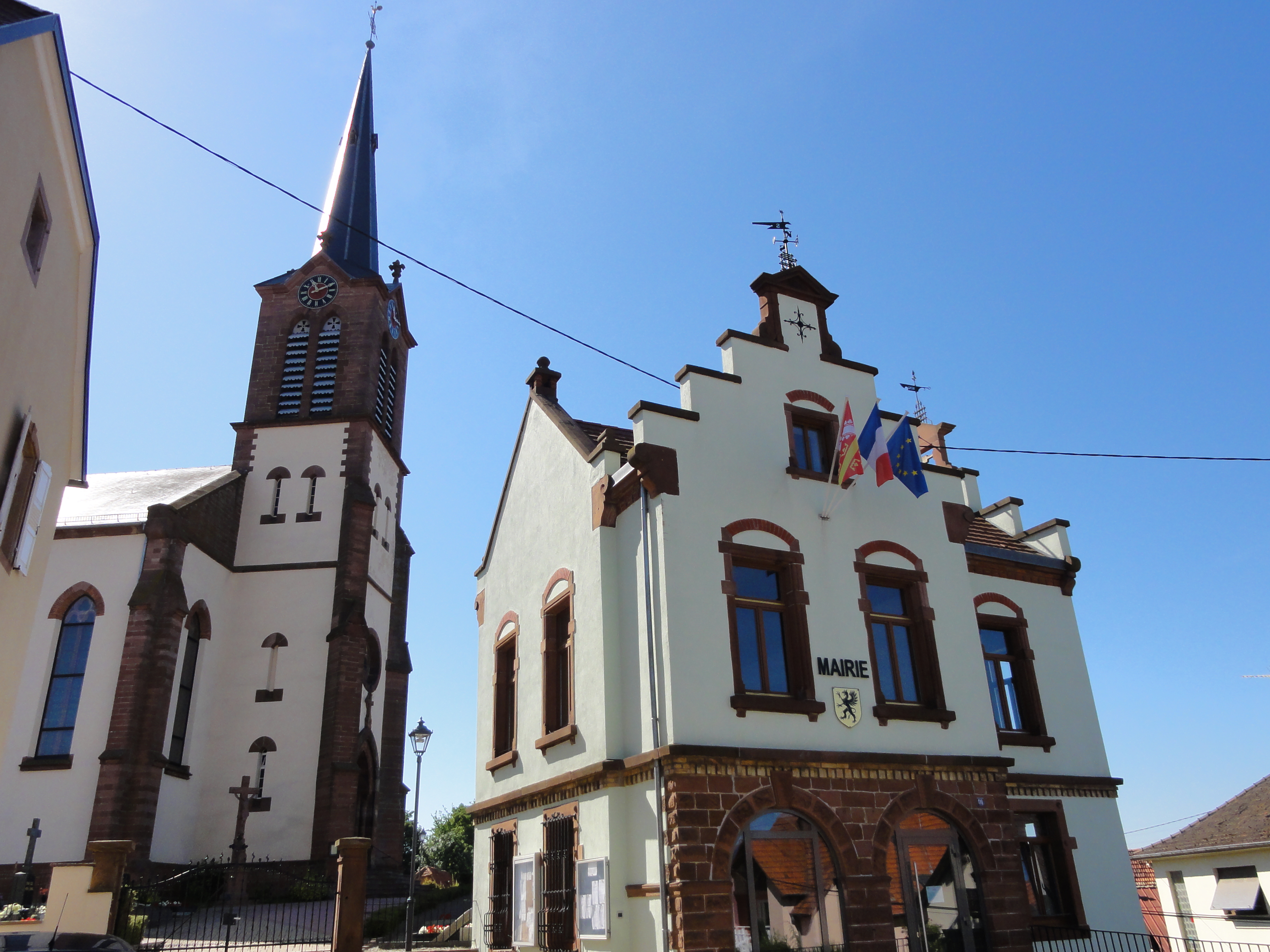 Alsace, Bas-Rhin, Uhlwiller, Église Saint-Pierre et Saint-Paul: . Mairie (XIXe): .